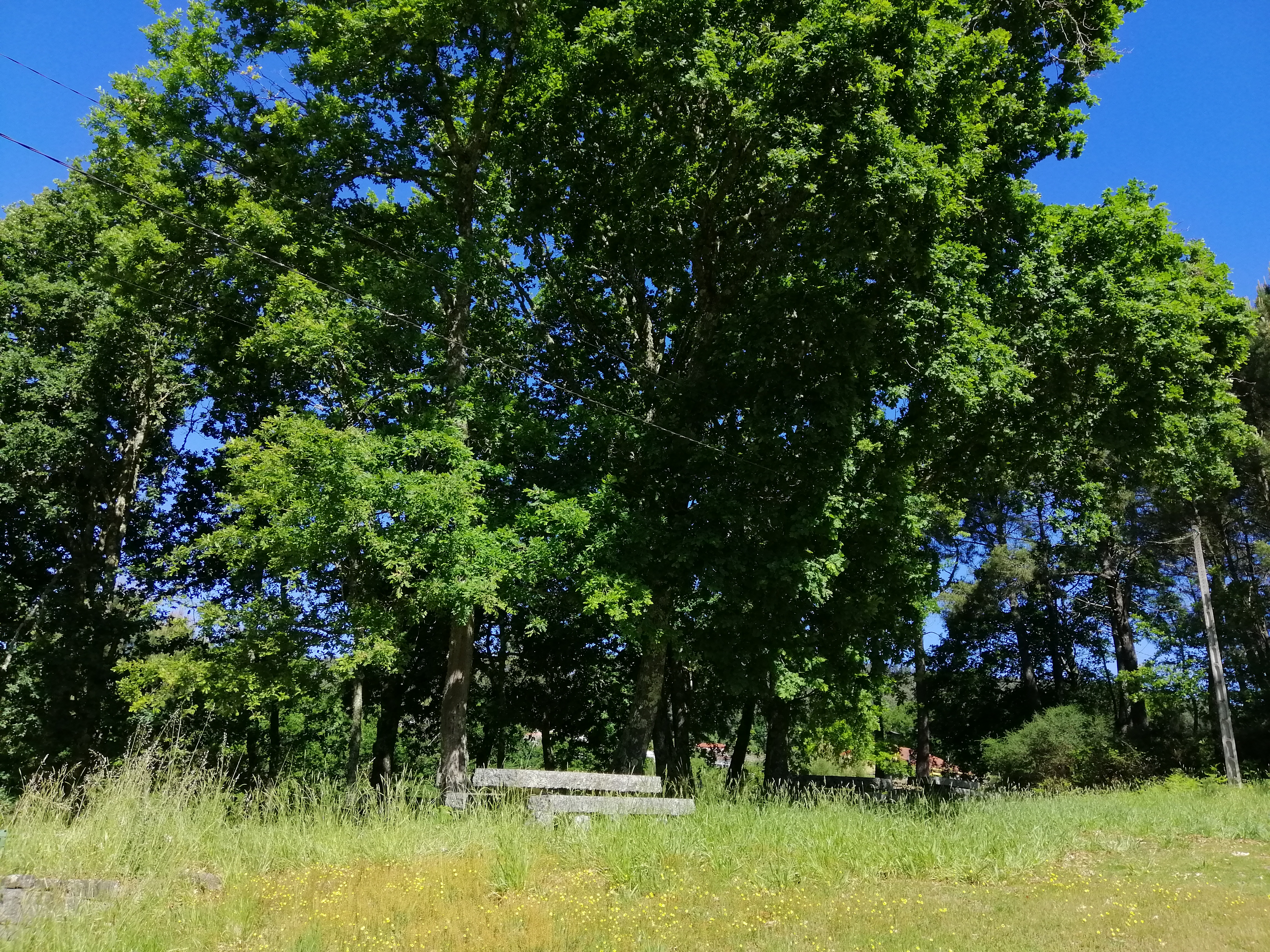 Couto do Santo Antonio, situado nos arredores da capela.